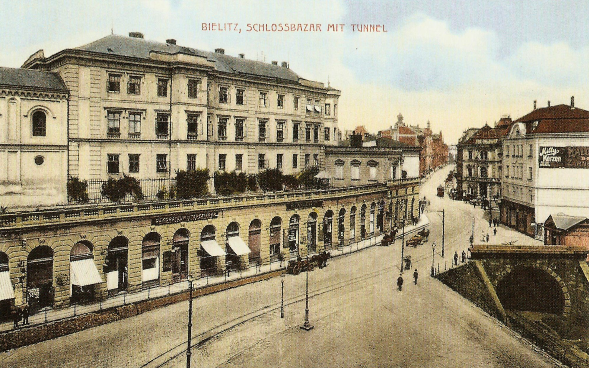 Bielsko-Biała. Zamek, Bazary Zamkowe, Tunel kolejowy